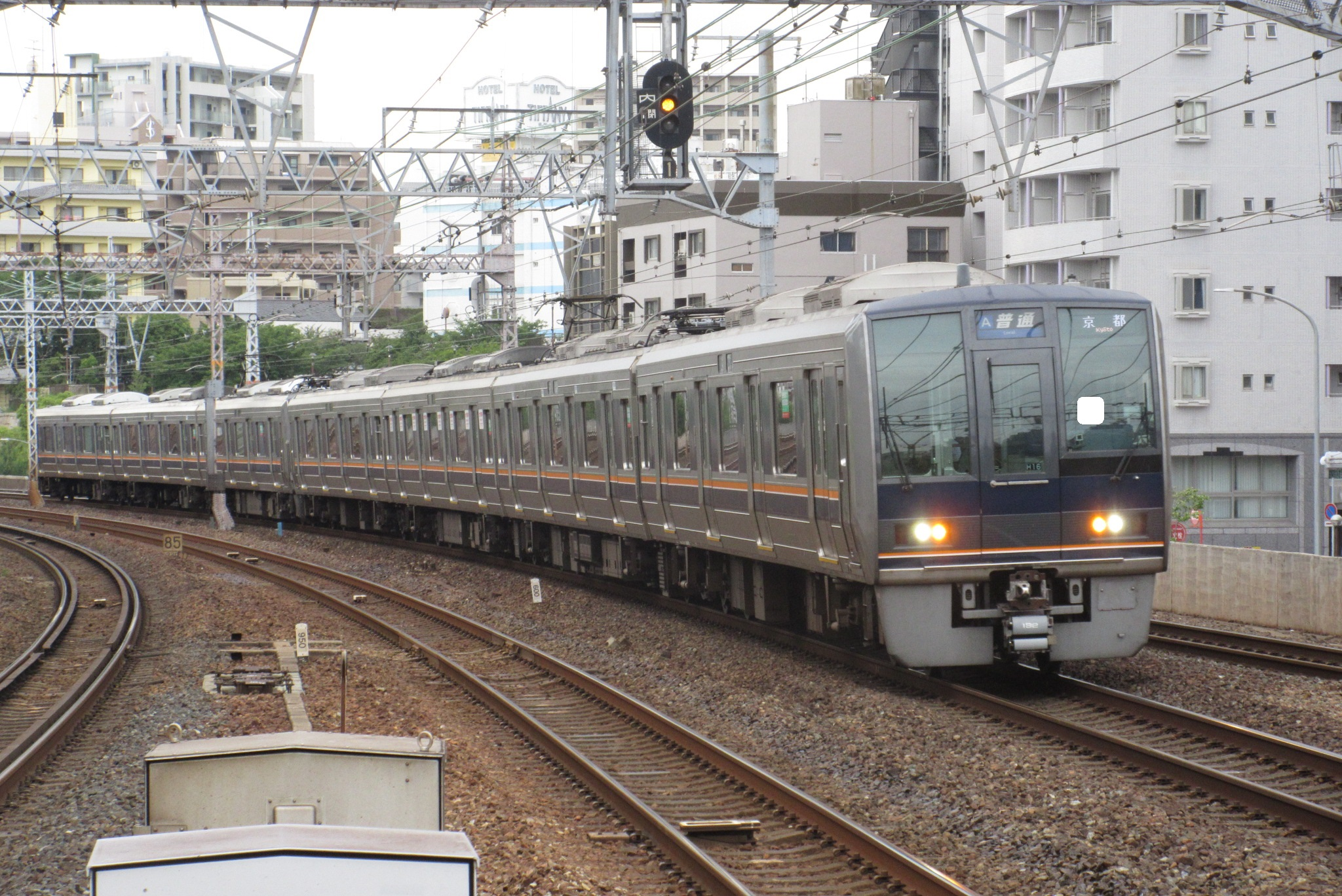 207系アカH16+S6